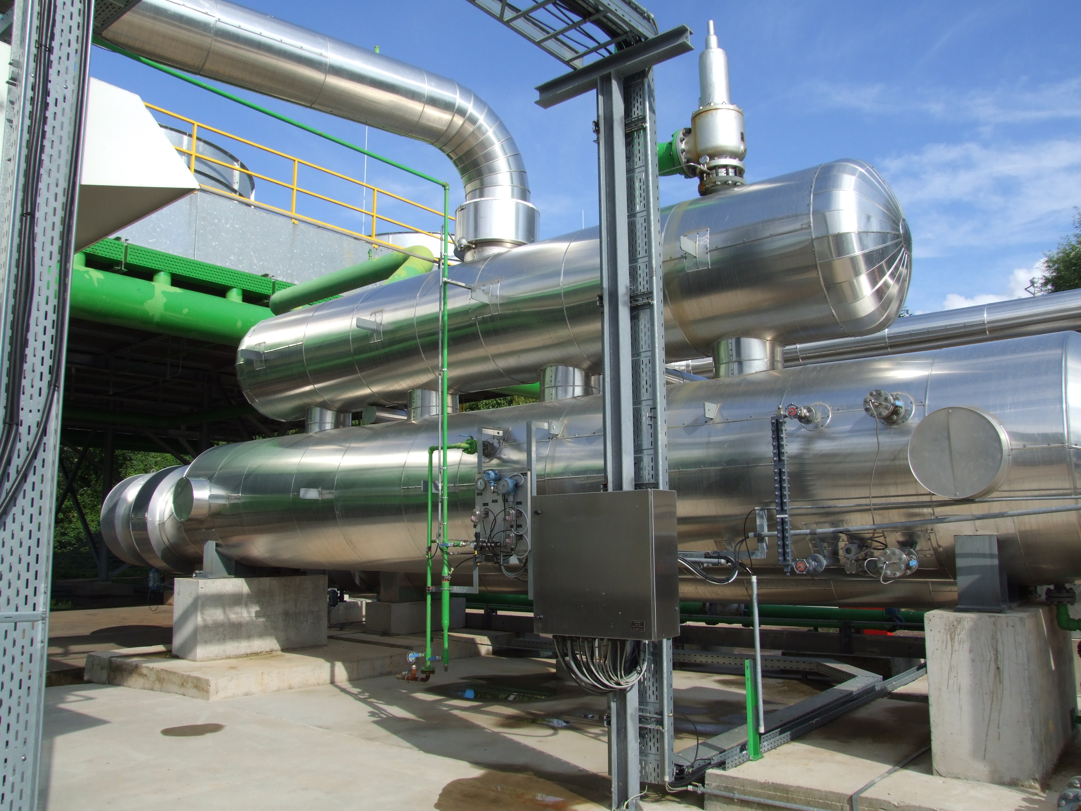 Wärmetauscher des GKW Landau, in dem das Thermalwasser das Trägermedium verdampft. Vorerhitzer und Verdampfer. Oben geht die Dampfleitung zur Turbine.